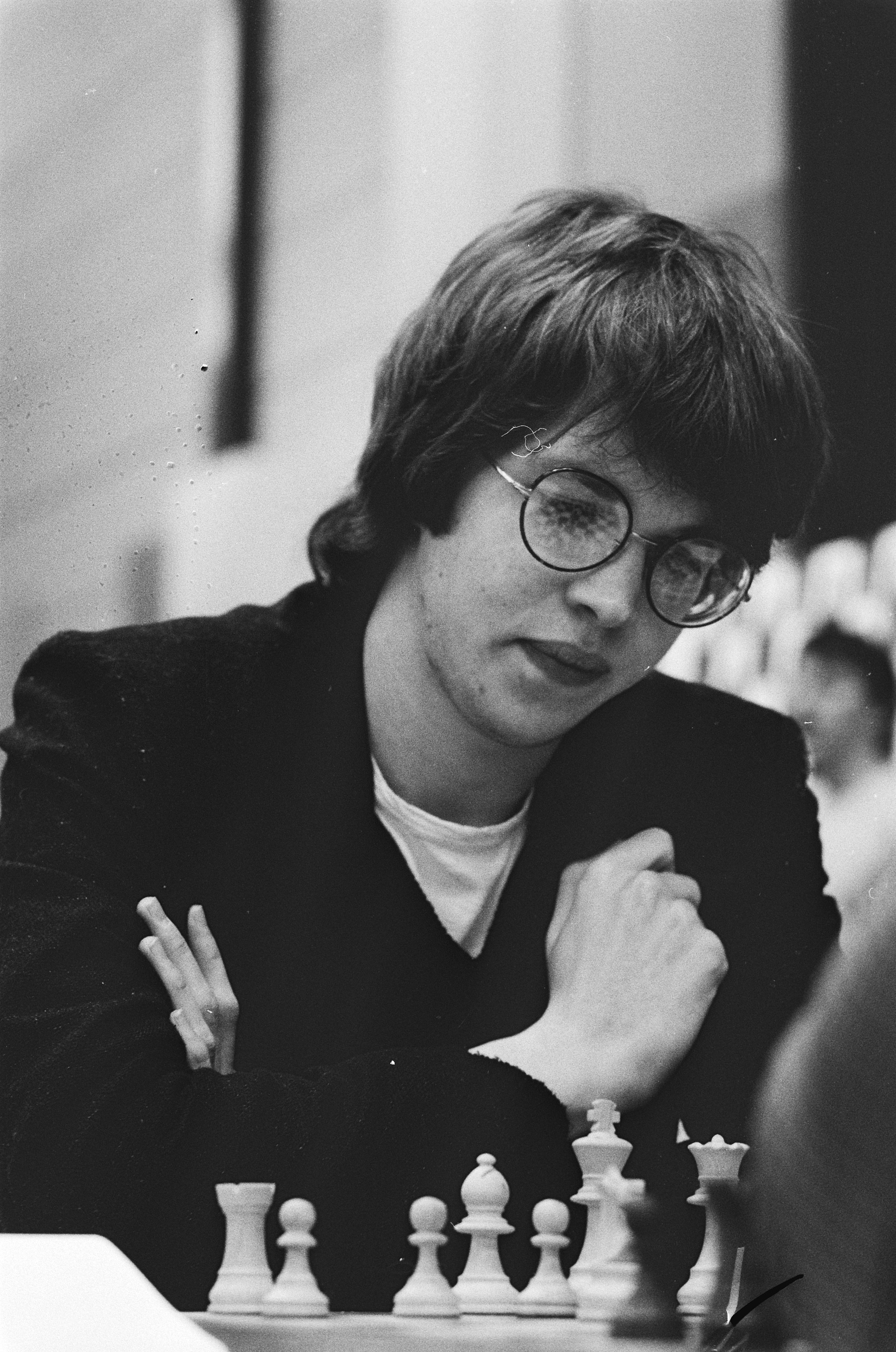 Collectie / Archief : Fotocollectie Anefo Reportage / Serie : Hoogovens Schaaktoernooi 1986 Beschrijving : Koploper Short (aan zet tegen Hort) Datum : 29 januari 1986 Locatie : Noord-Holland, Wijk aan Zee Trefwoorden : schaken, toernooien Persoonsnaam : Short, Nigel Fotograaf : Croes, Rob C. / Anefo, [onbekend] Auteursrechthebbende : Nationaal Archief Materiaalsoort : Negatief (zwart/wit) Nummer archiefinventaris : bekijk toegang 2.24.01.05 Bestanddeelnummer : 933-5538